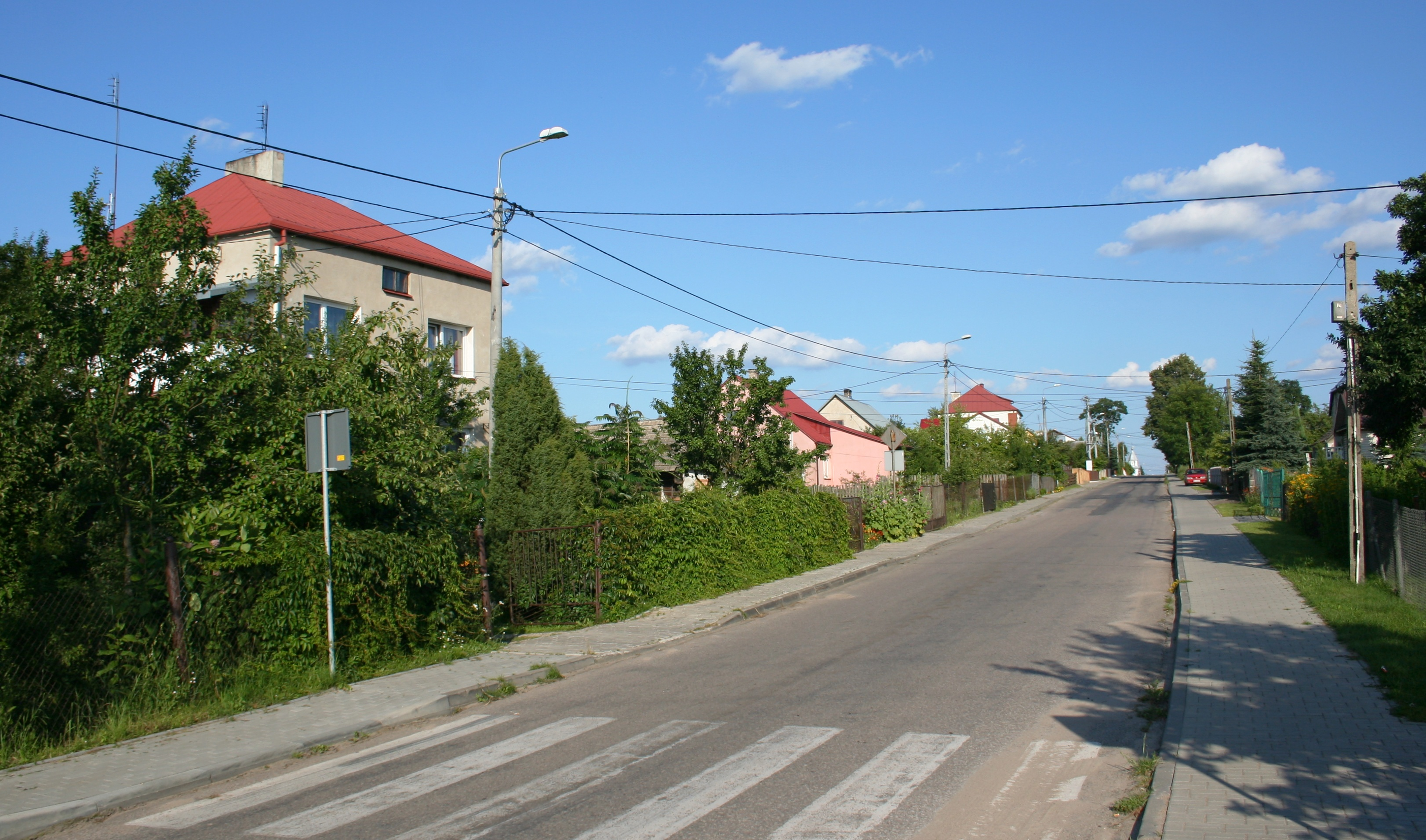 Fragment wsi Stare Lewkowo, gmina Narewka, woj. podlaskie